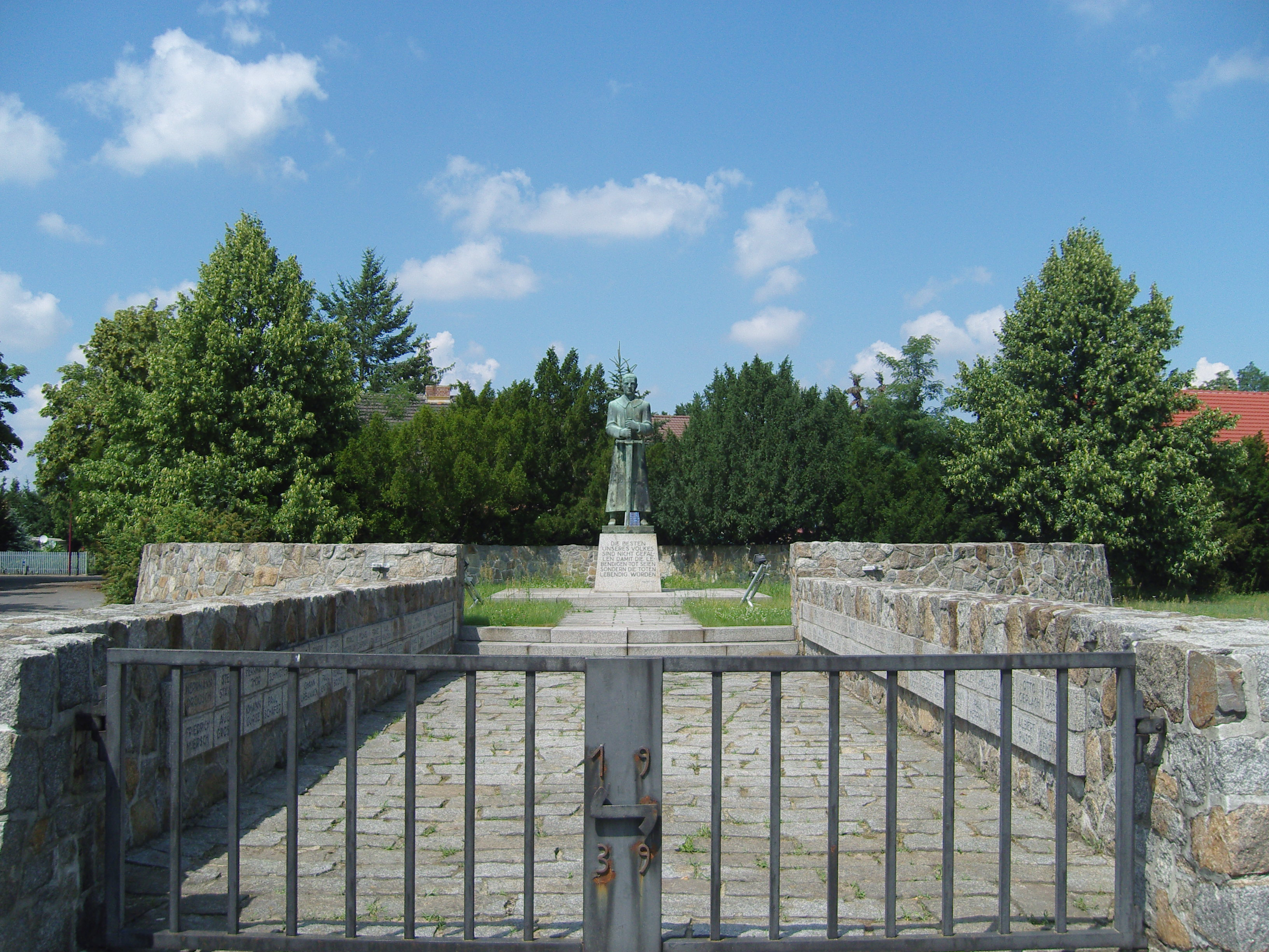 Kriegerdenkmal für die Gefallenen des Ersten Weltkriegs im Großräschener Ortsteil Freienhufen